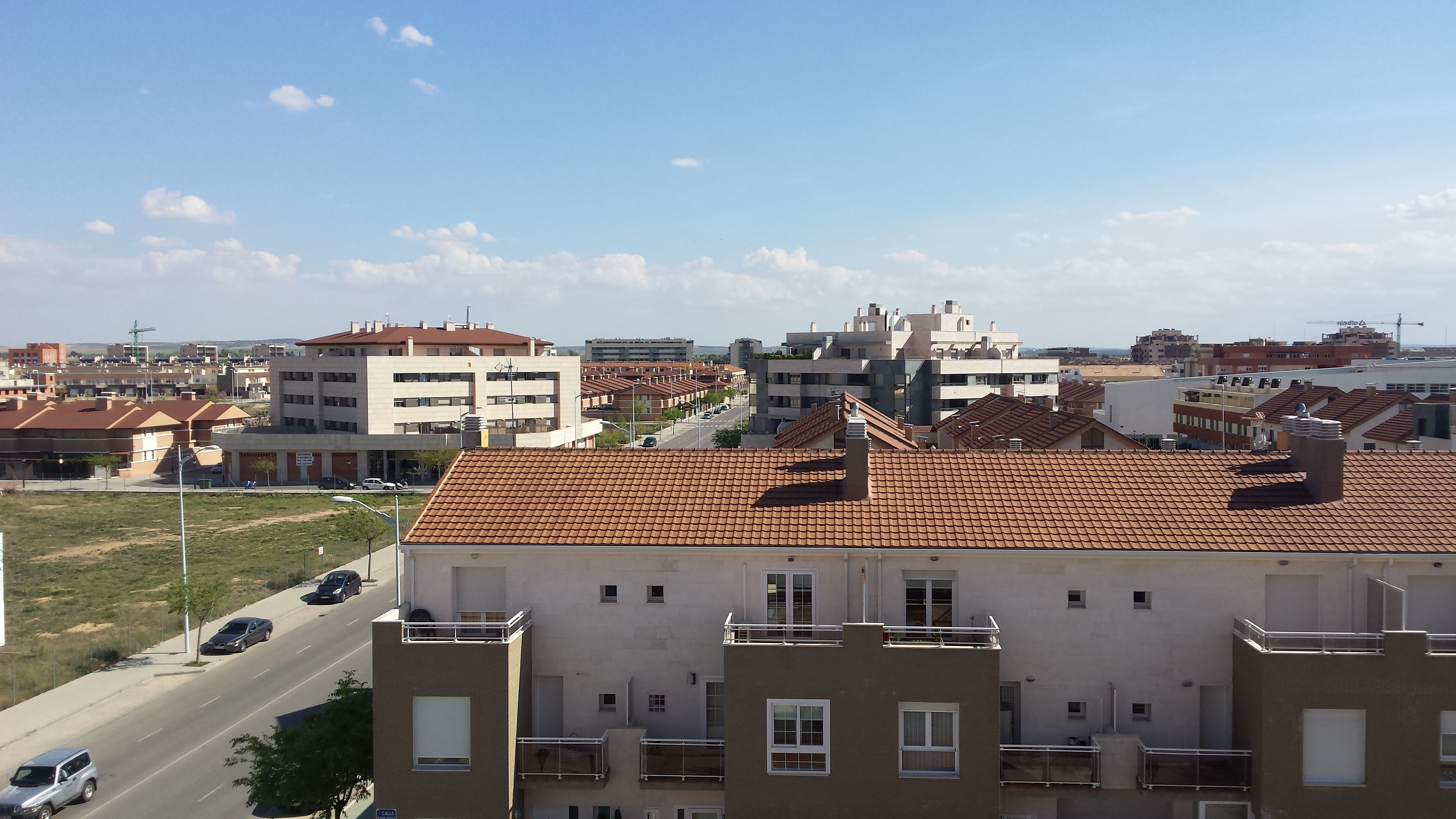 Barrio Facultad de Medicina Albacete